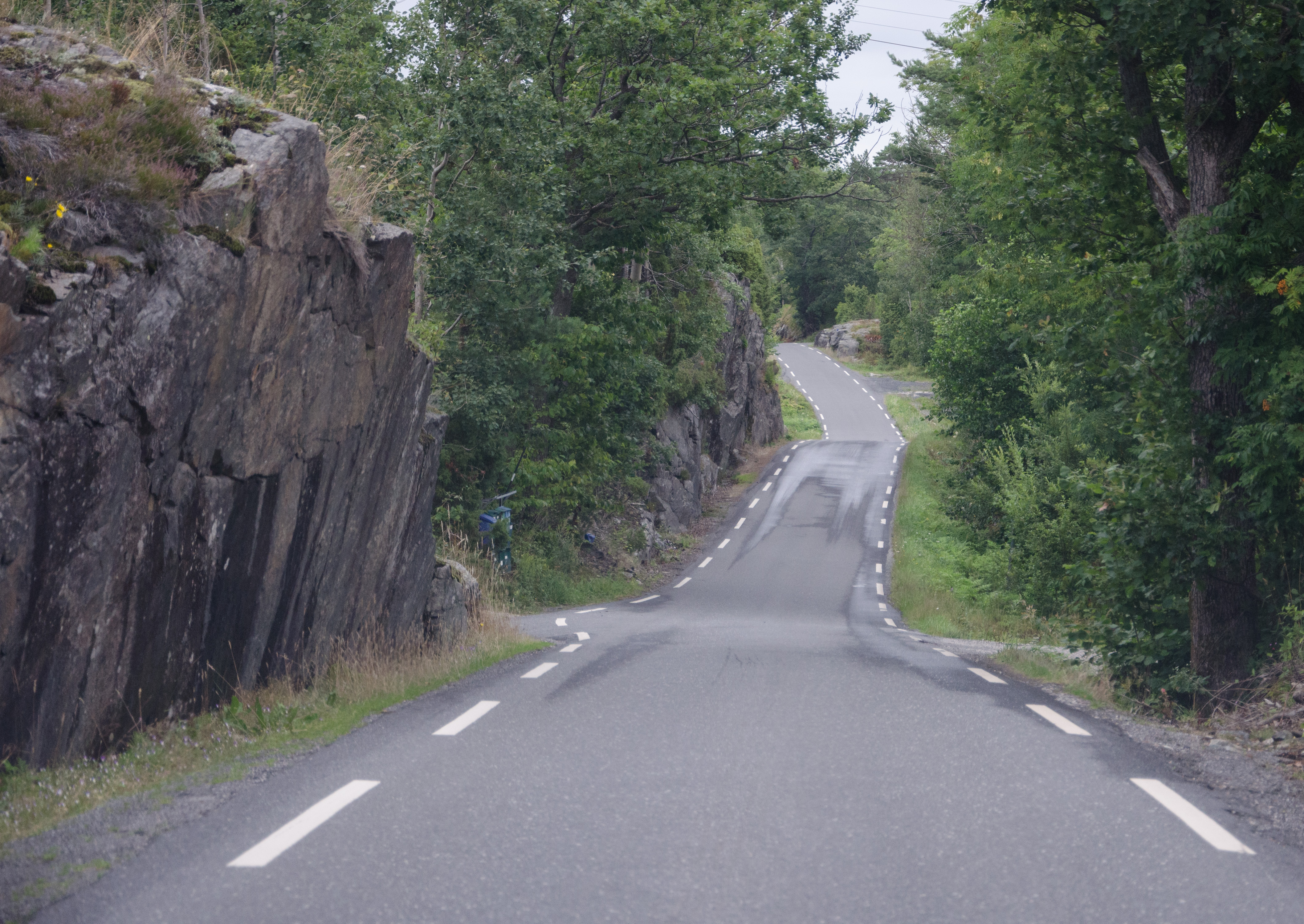 Telemarks fylkesvei 254